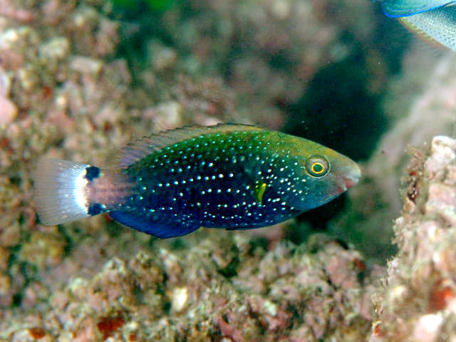 ブチブダイ Scarus niger